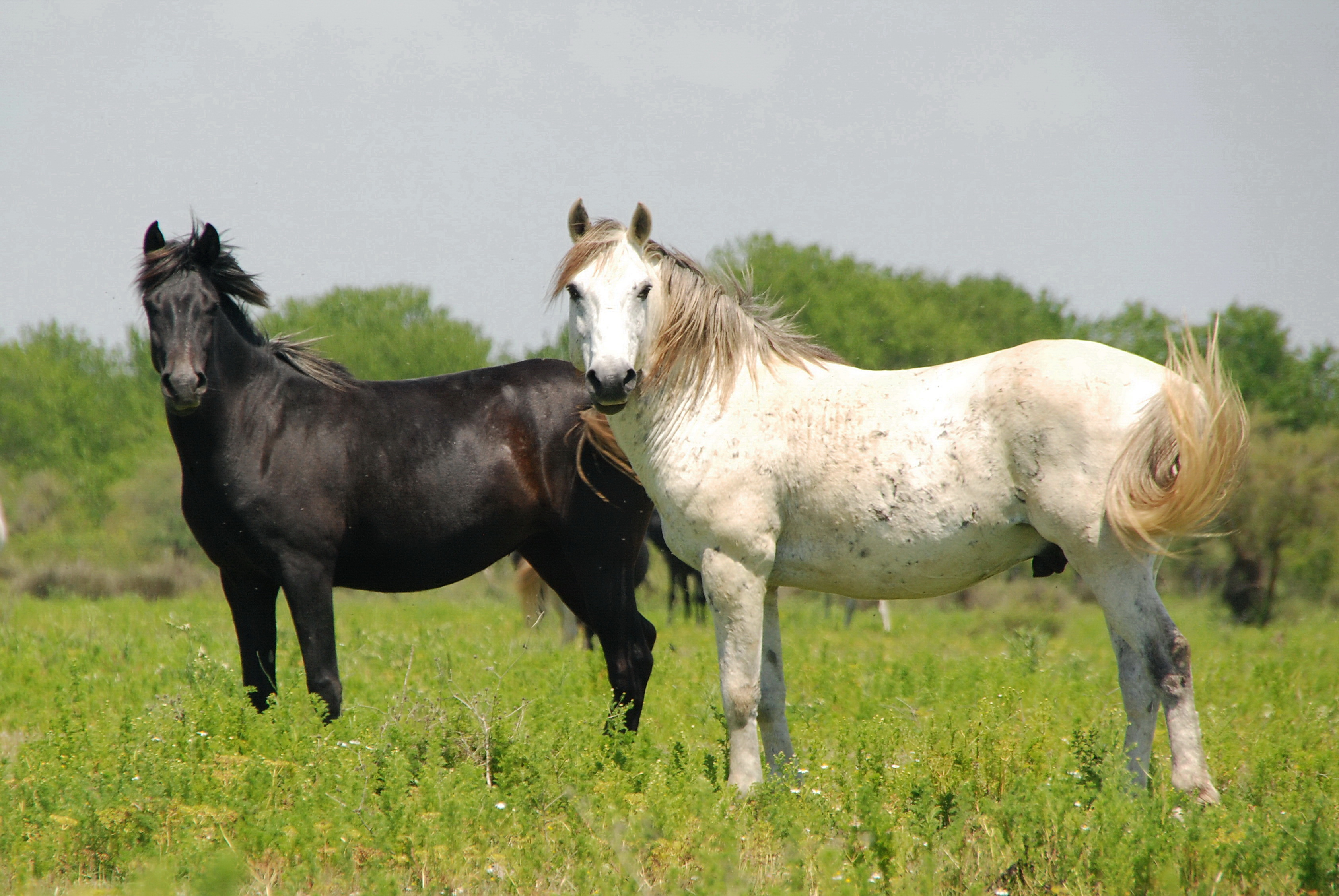 Wild horses living in the meadows of the Axios Delta. This is a photography of Natura 2000 protected area with ID GR1220010